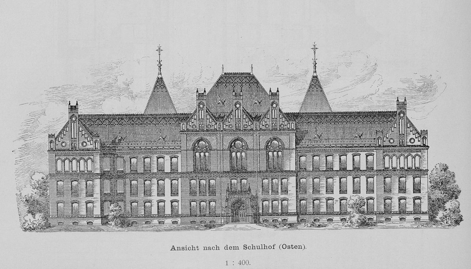 Prinz-Heinrichs-Gymnasium in Berlin-Schöneberg, Ansicht des Schulhofs, Ostseite (Zeichnung 1894)